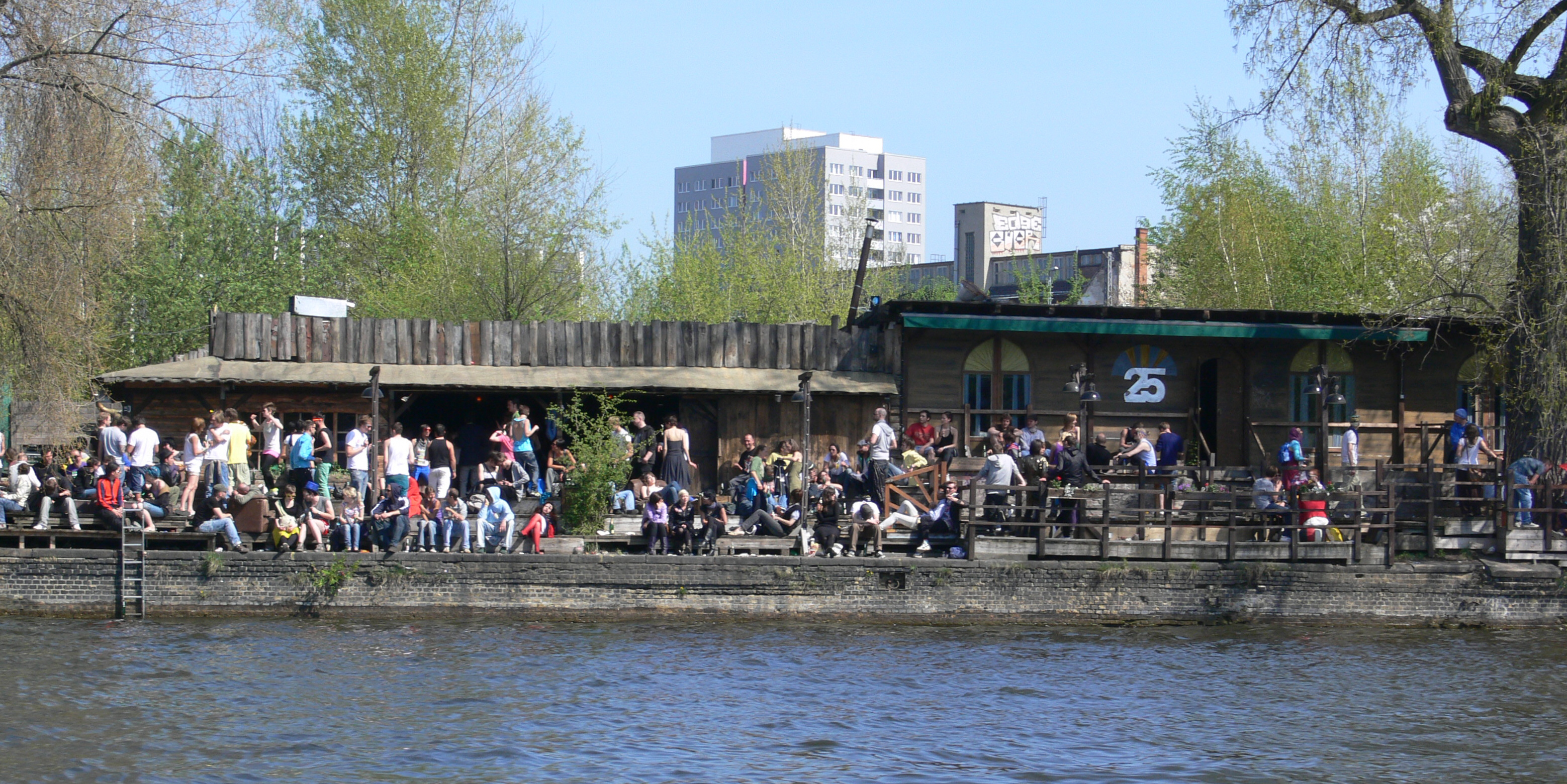 Berlin-Friedrichshain, "Bar 25", Holzmarktstraße 25, Spreeseite